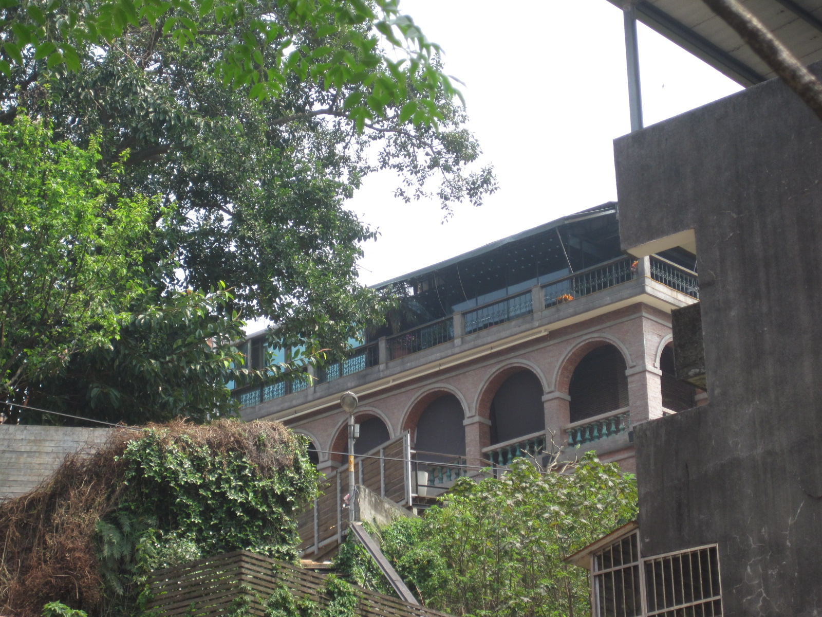 淡水紅樓